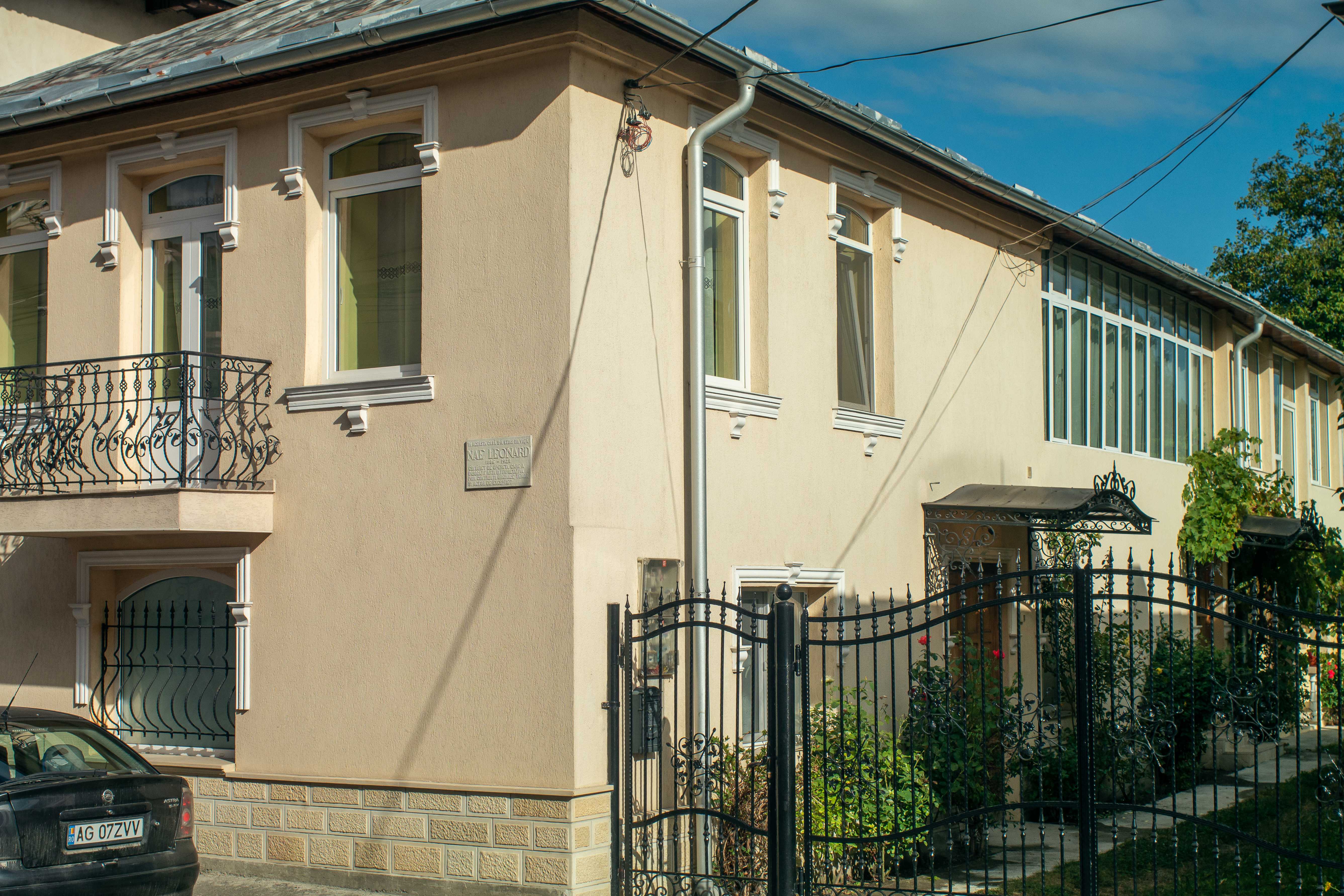 Casa tenorului Nicu Leonard, Câmpulung.